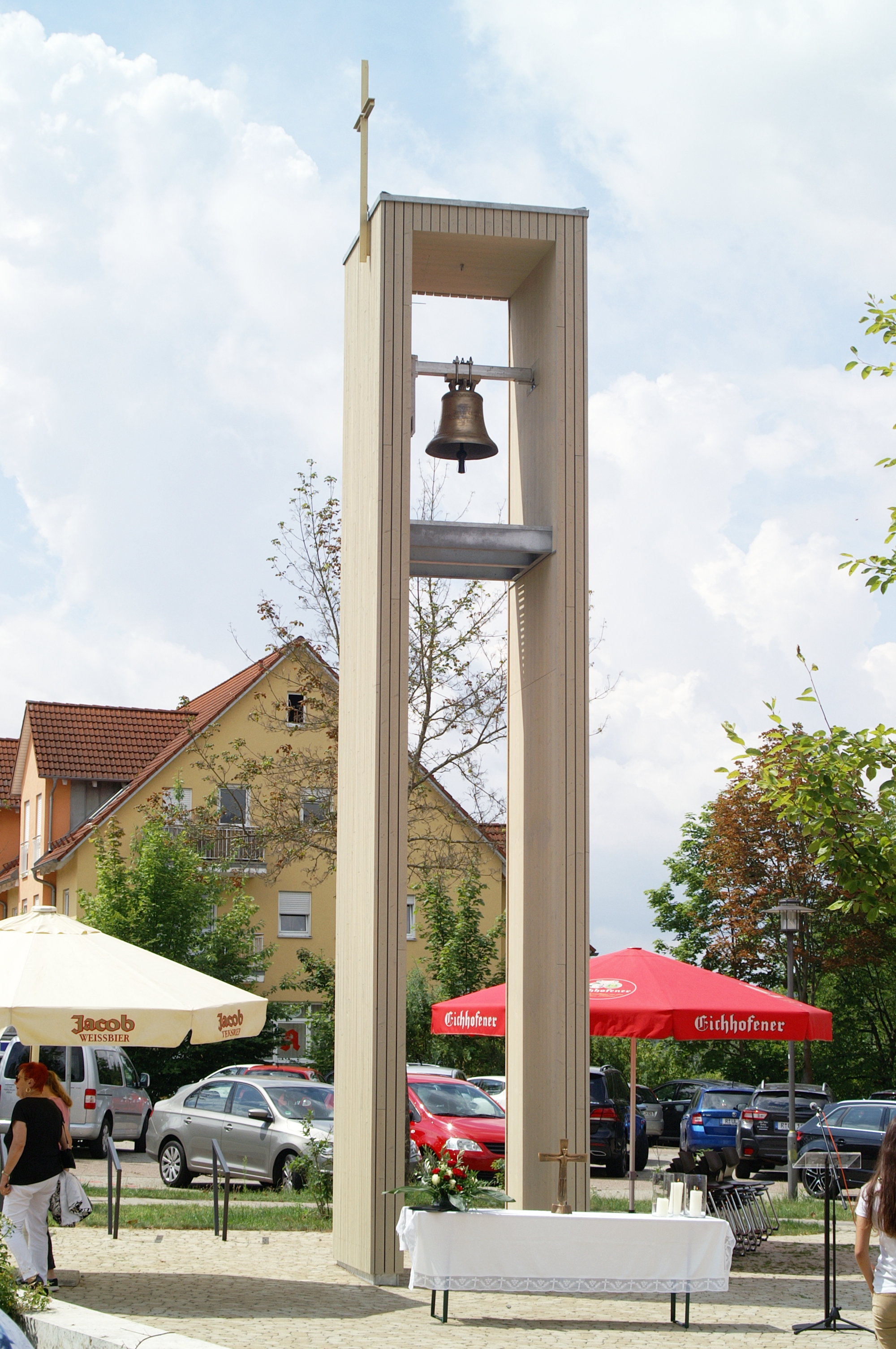 Glockenturm der Dietrich-Bonhoeffer-Kirche in Wenzenbach, kurz nach der Glockenweihe